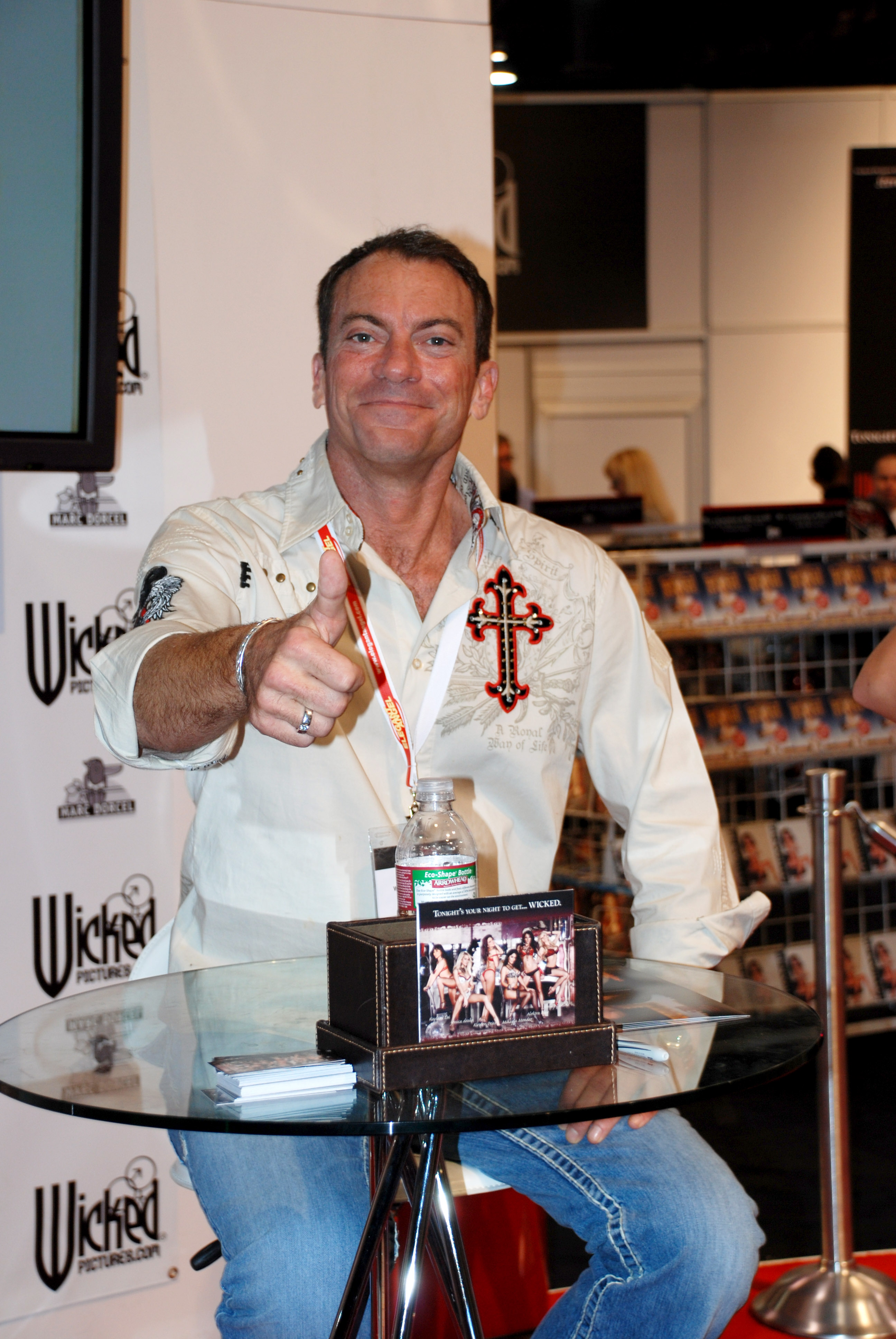 AEE2009_Jan09_Nikon 201